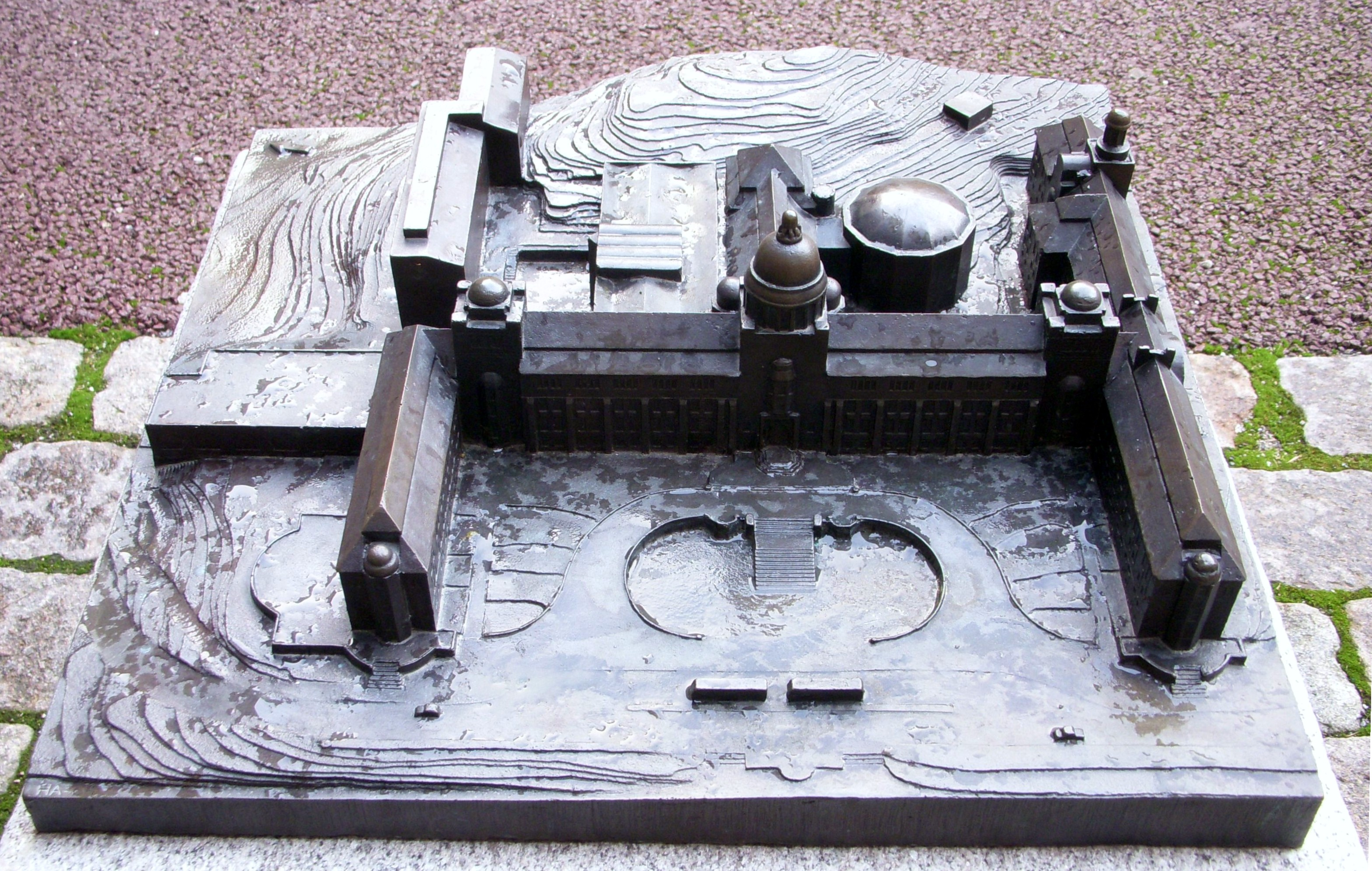 Naturhistoriska Riksmuseet i Stockholm, modell